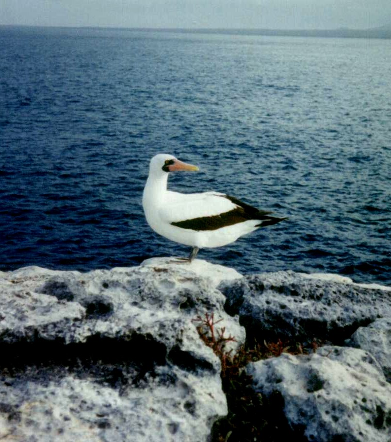 Sula granti. Piquero de Nazca. Tomada en la Isla Plazas (Galápagos).